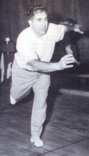 Immagine di Andy Varipapa (Carfizzi, 31 marzo 1891 - Hempstead, 25 agosto 1984). L'immagine è PD-Old in quanto l'autore è morto oltre 70 anni fa.